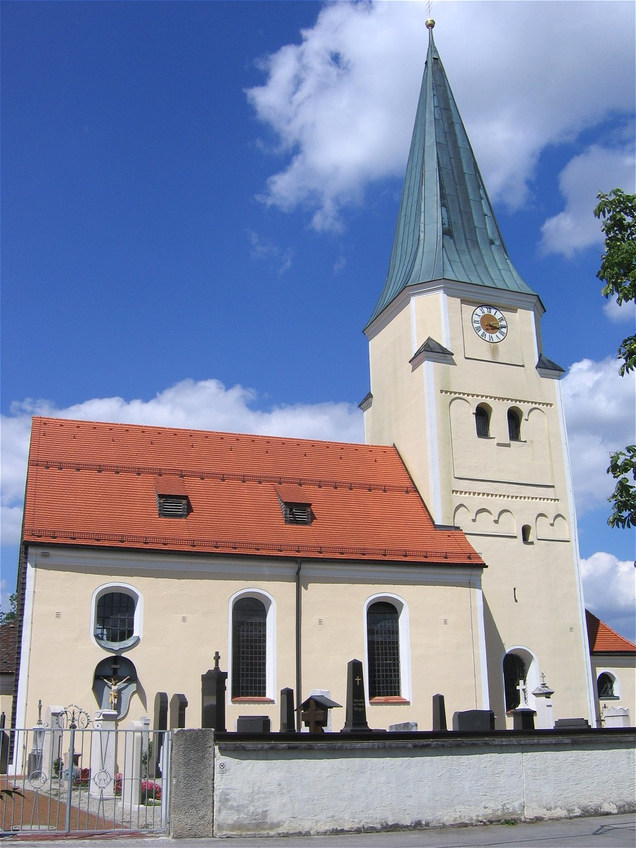 Pfarrkirche St. Johannes der Täufer in Taufkirchen bei München